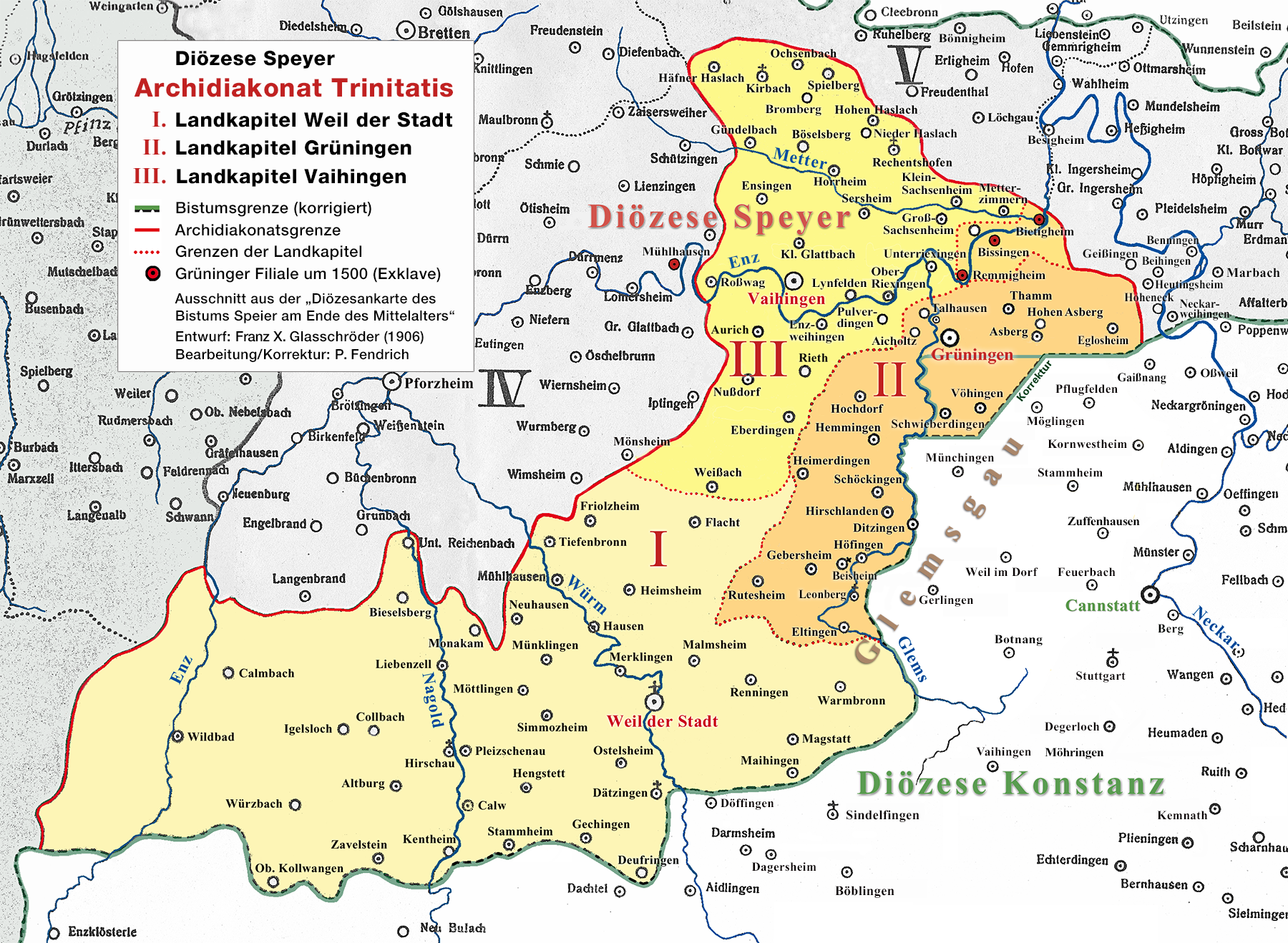 Landkapitel Weil der Stadt, Grüningen und Vaihingen im Archidiakonat Trinitatis der Diözese Speyer (15. Jhdt.). Korrekturen: Schwieberdingen und Vöhingen (Wüstung) integriert; Grüninger Filialen in der Exklave ergänzt: Mühlhausen, Remmigheim (Wüstung, verlagert nach Untermberg), Bissingen und Bietigheim. Grüninger Filiale "St. Johann" bei Talhausen sowie die Wüstungen Bromberg, Pulverdingen und Aicholtz ergänzt.